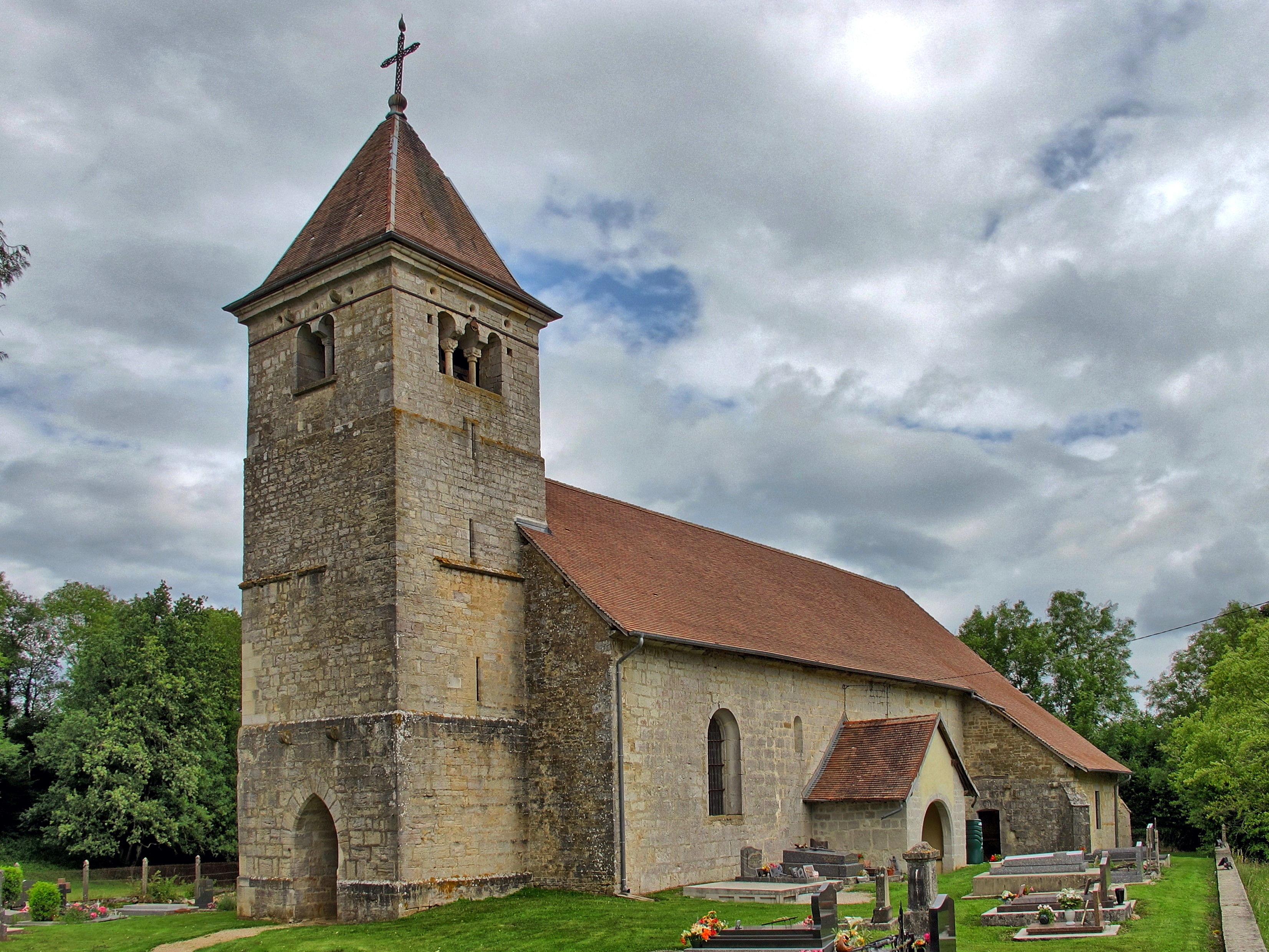 Inscrit aux nonuments historiques sous le numéro : PA00101619